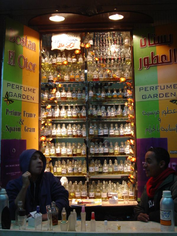 Perfume stall in Cairo metro